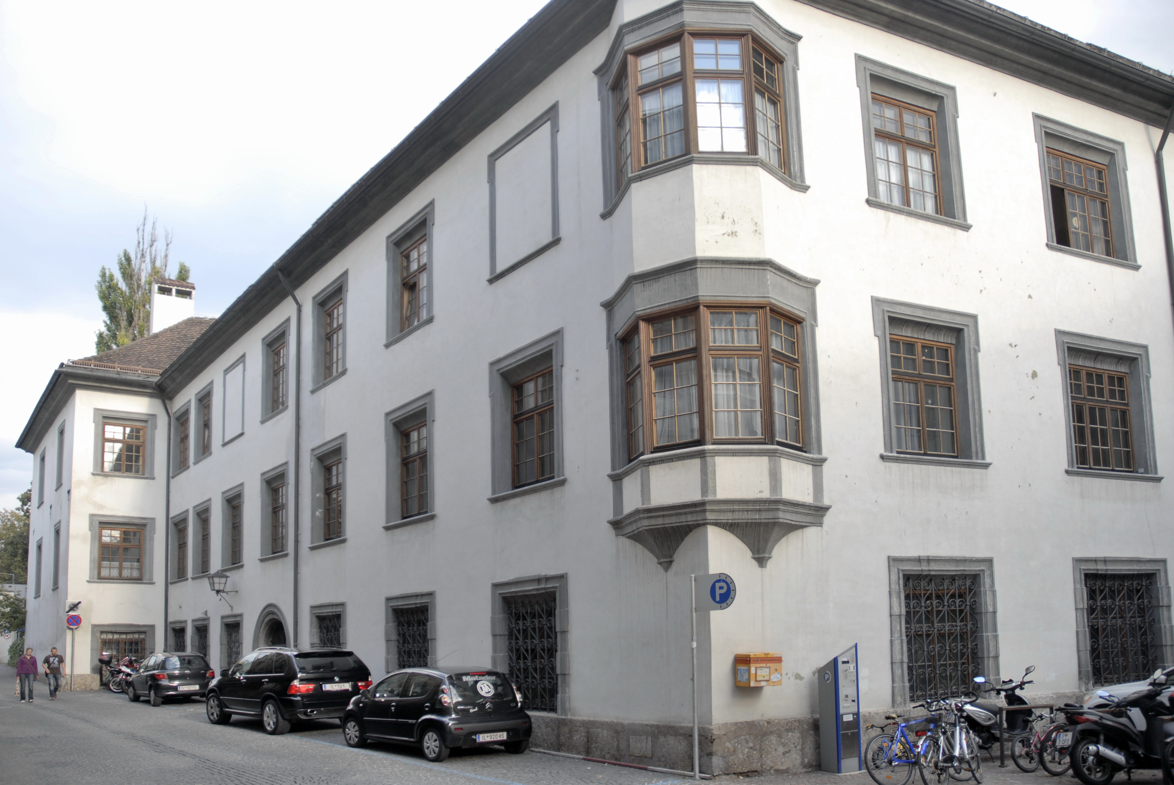 Hall in Tirol, Haus Schulgasse 6